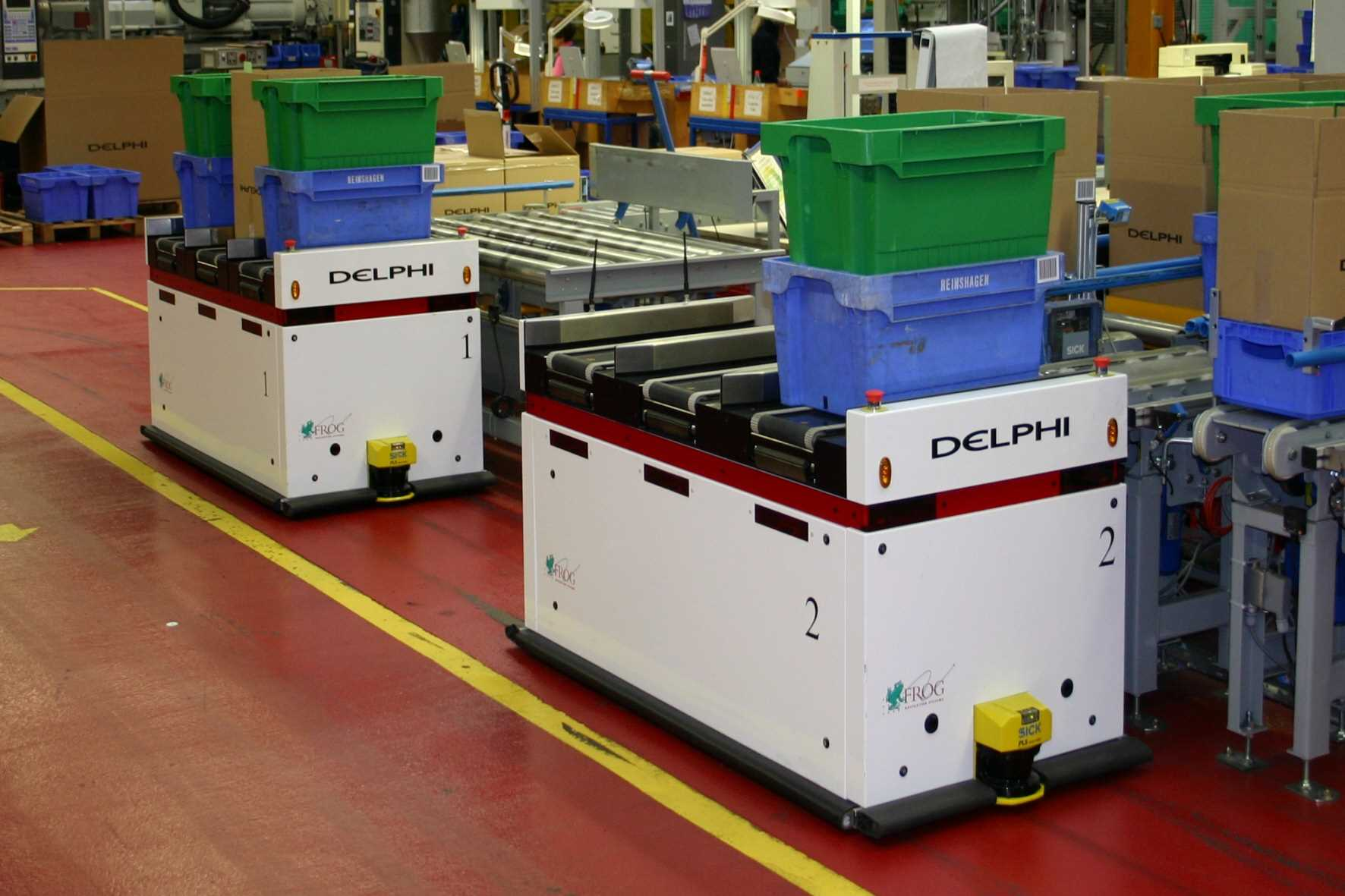 FTF zum Transport/Handling von KLT mit 3 Gurtförderern